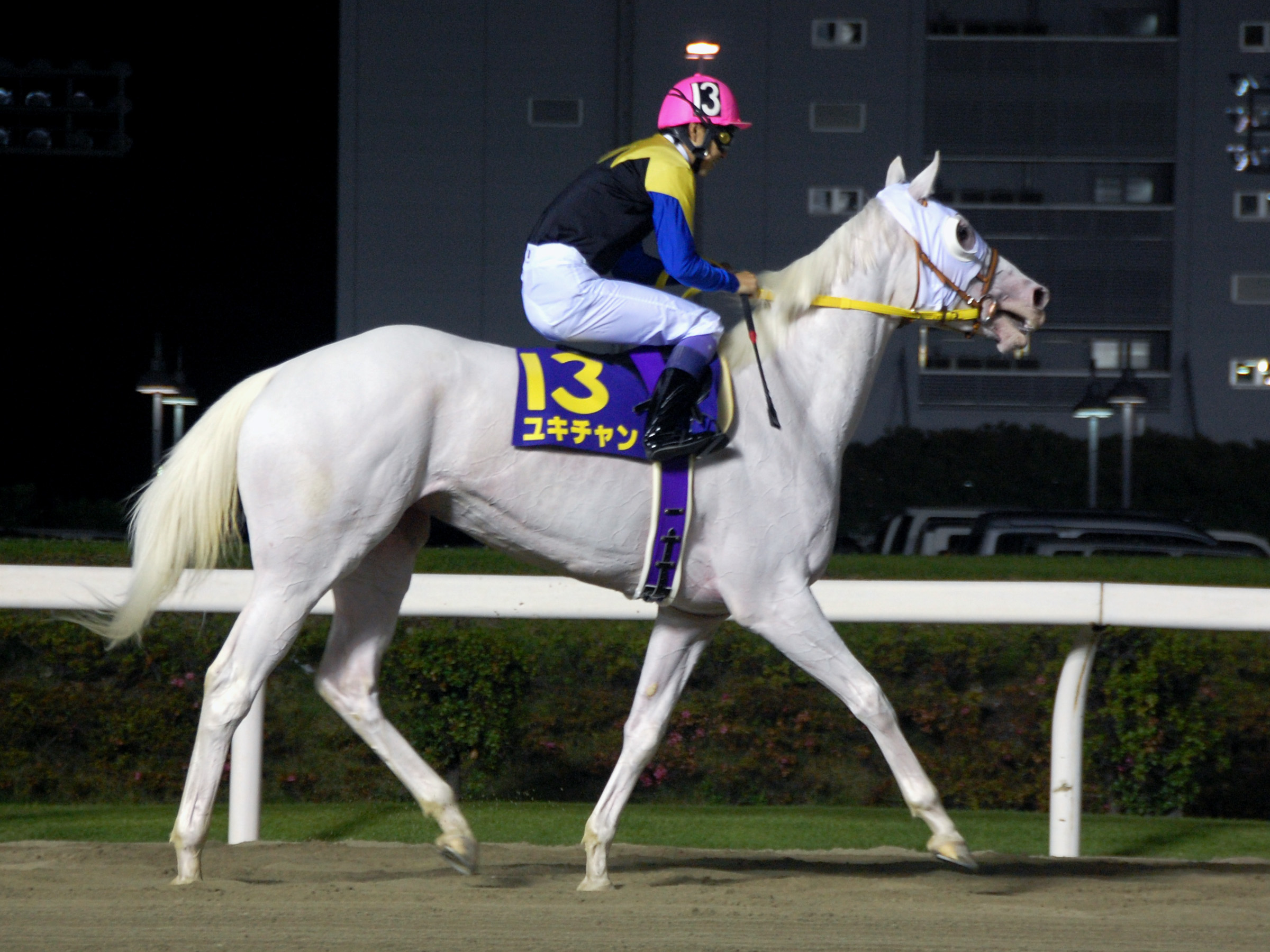 日本の競走馬、ユキチャン（鞍乗：武豊）。2008年6月18日 川崎競馬場にて。